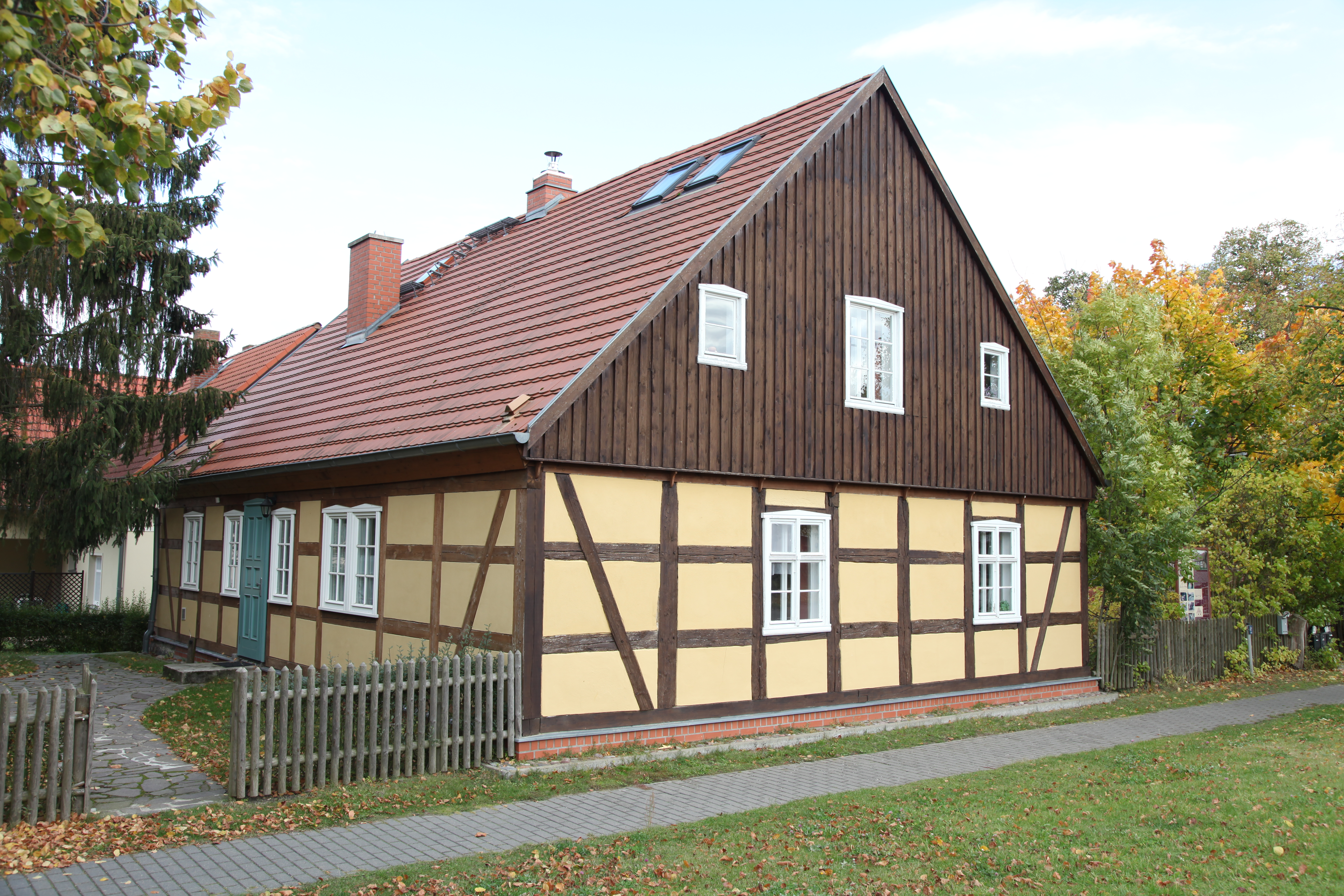 Kötter